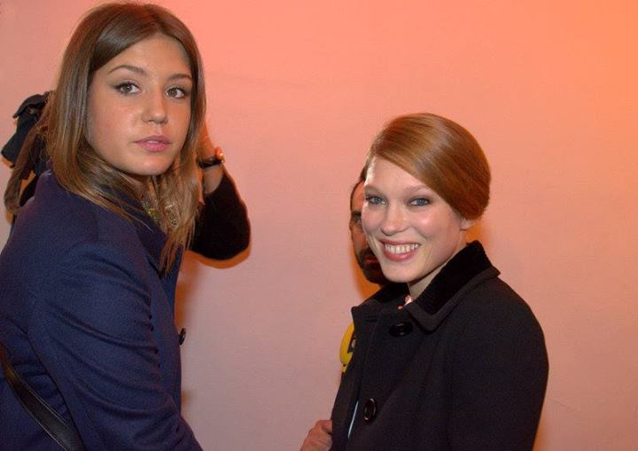 Léa Seydouyx et Adèle Exarchopoulos à la cérémonie des prix Lumières 2014